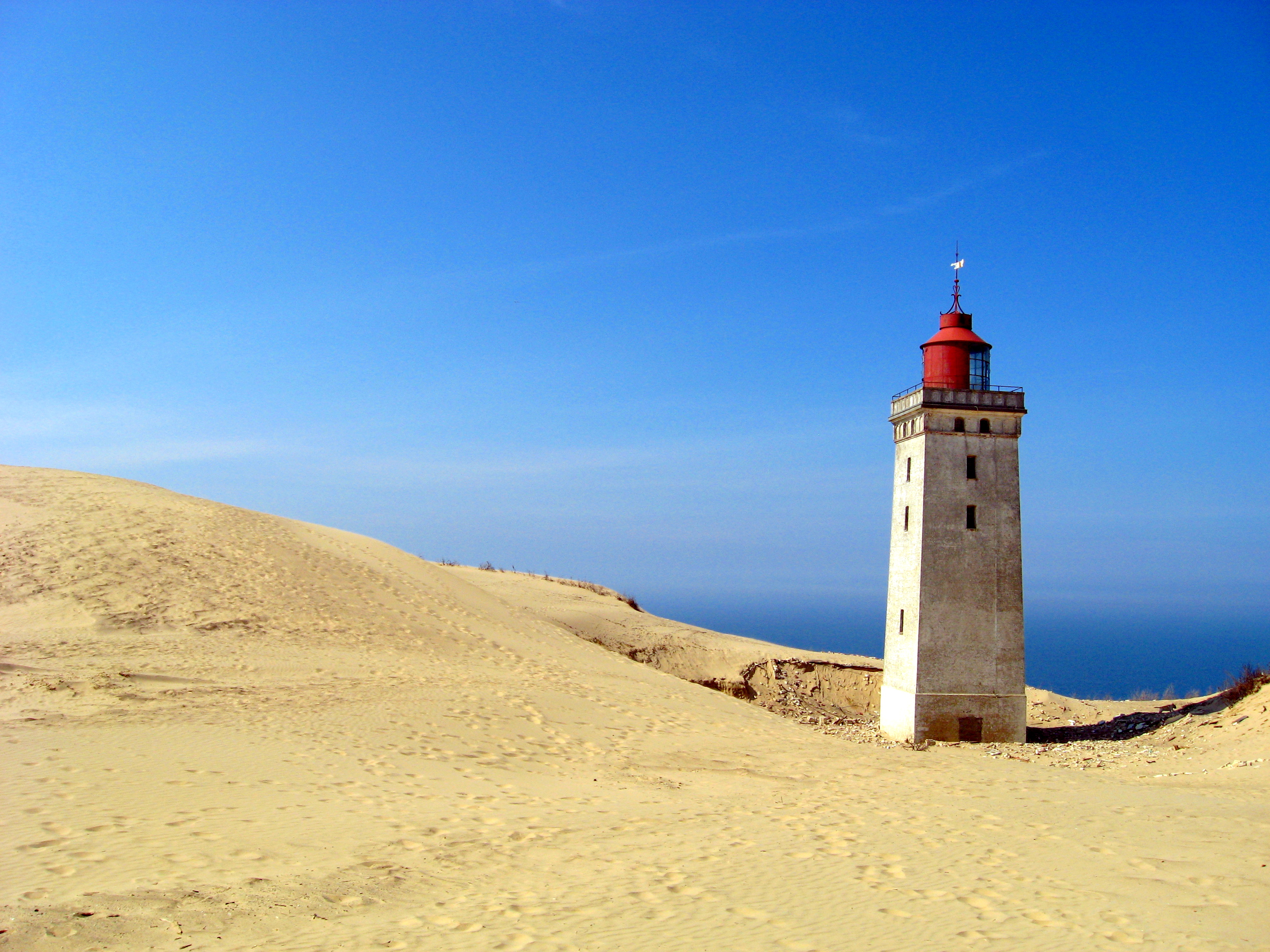 Rubjerg Knude, 2009